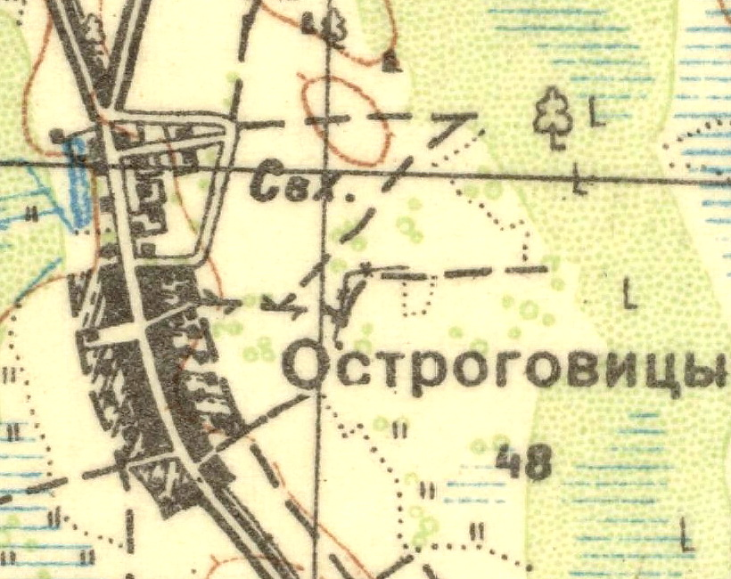 Топографическая карта Ленинградской области, квадрат О-35-23-В (Хотыницы), деревня Остроговицы